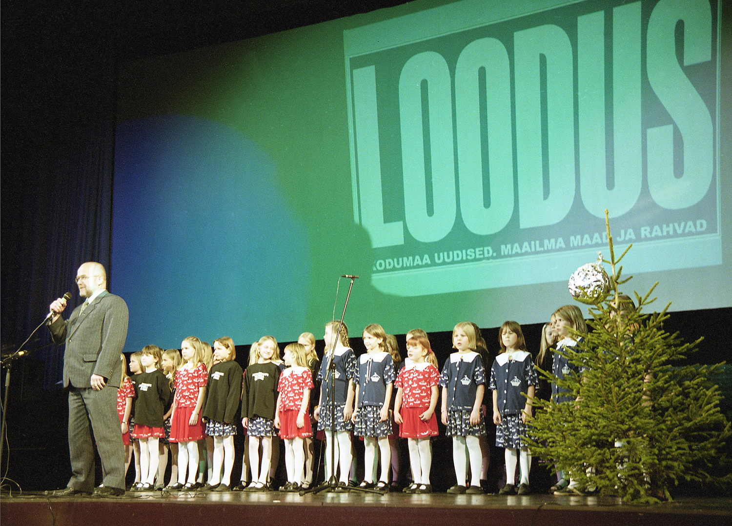 Toomas Jüriado, ajakirja Loodus (97-01) aastapäev 2001